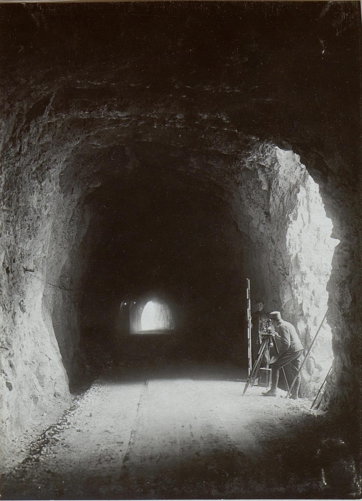 Bau der Barricatastraße.